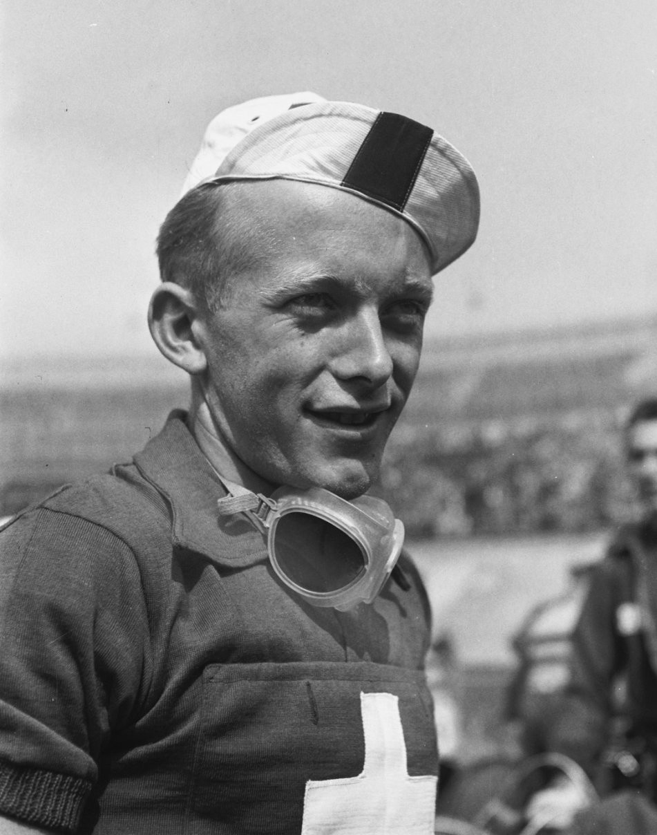 Portretten deelnemers Tour de France, Hollenstein (Zwitserland)